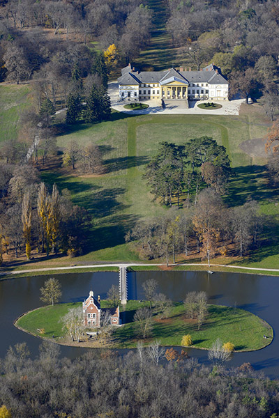 A kastélypark, Magyarország legszebb tehén istállójával, a Hollandi-házzal